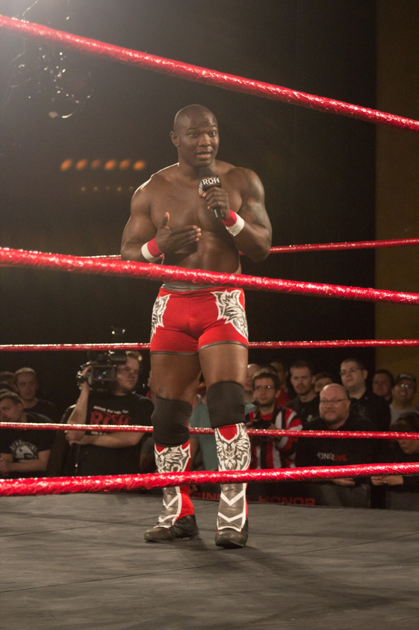 ROH WRESTLER SHelton Benjamin